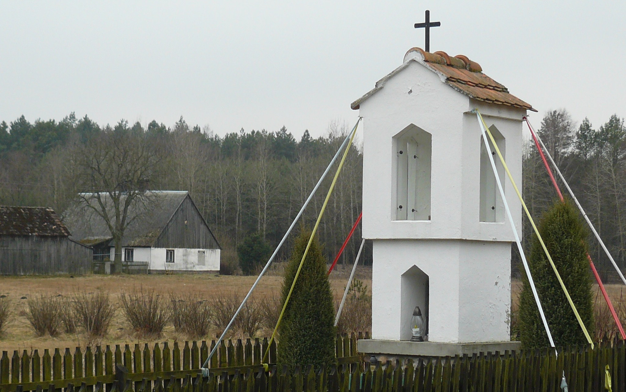 Kwiejce Nowe w Puszczy Noteckiej.